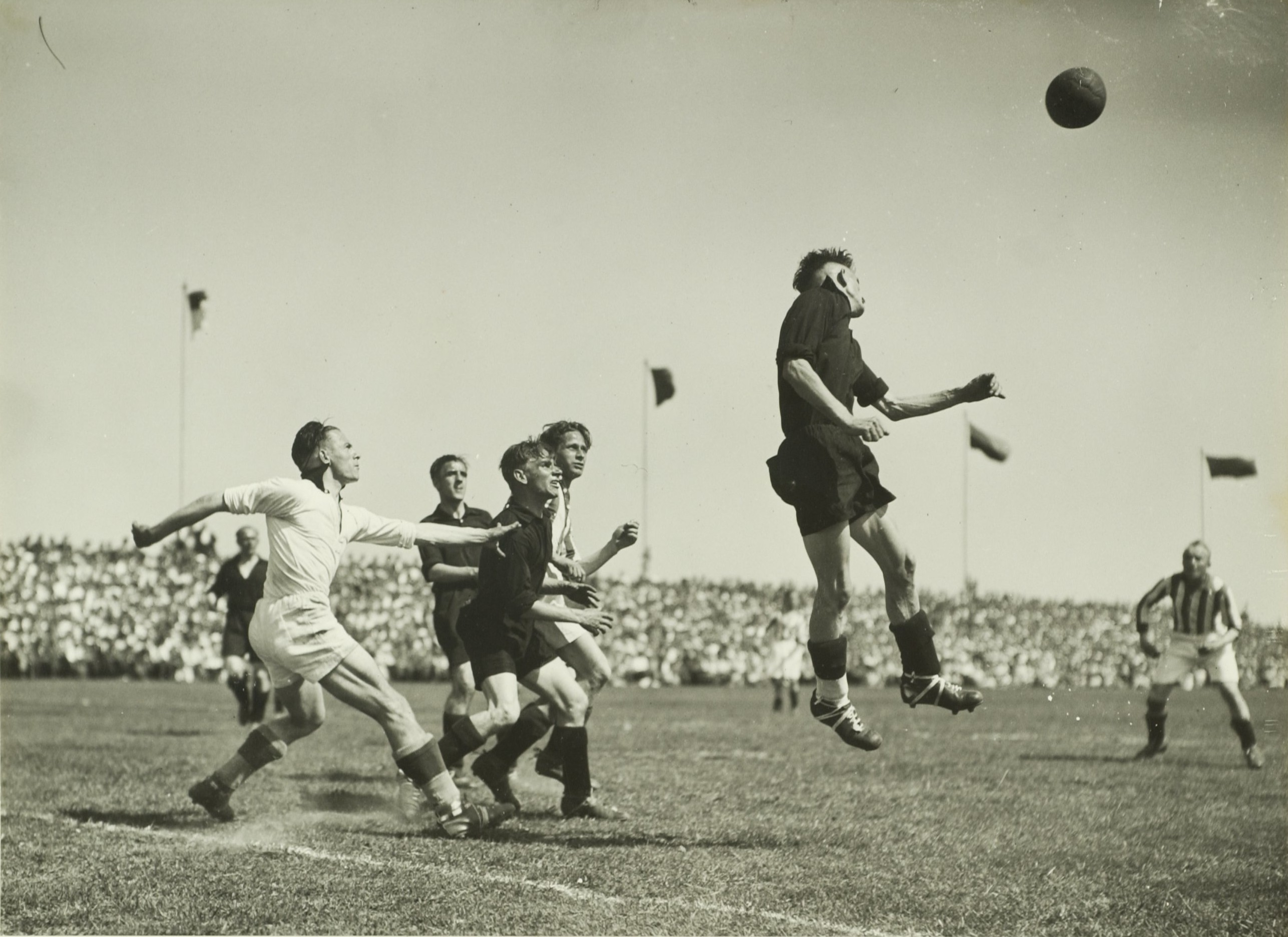 CollectieCollectie Fotoburo de BoerInventarisnummerNL-HlmNHA_5400465612BeschrijvingSpelmoment uit de wedstrijd E.D.O. - B.V.V. waarbij een aanval op het doel van de gasten wordt afgeslagen.FotonummerNL-HlmNHA_5400465612DocumenttypeHistorieprenten, tekeningen en foto'sVervaardigerBoer, Cees de (1918-1985) Soort vervaardigerFotograaf LandNederland ProvincieNoord-Holland GemeenteHaarlem PlaatsHaarlem Begindatum1948Einddatum1948TechniekFoto Trefwoordenvoetbalwedstrijden, voetbalclubs, voetbalverenigingen, sport en recreatie Plaatsinggb50